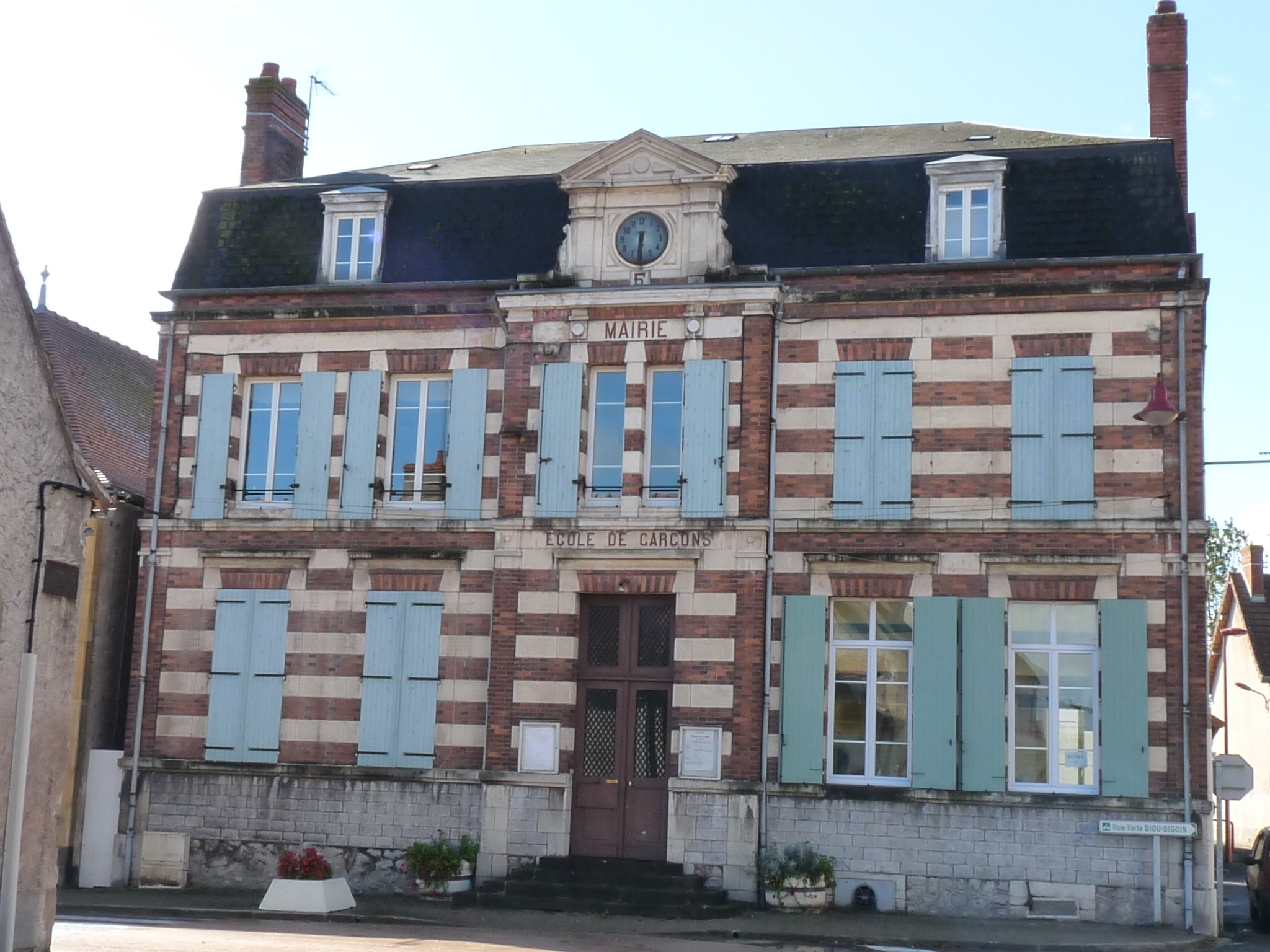 Mairie von Pierrefitte-sur-Loire, Frankreich, Département Allier